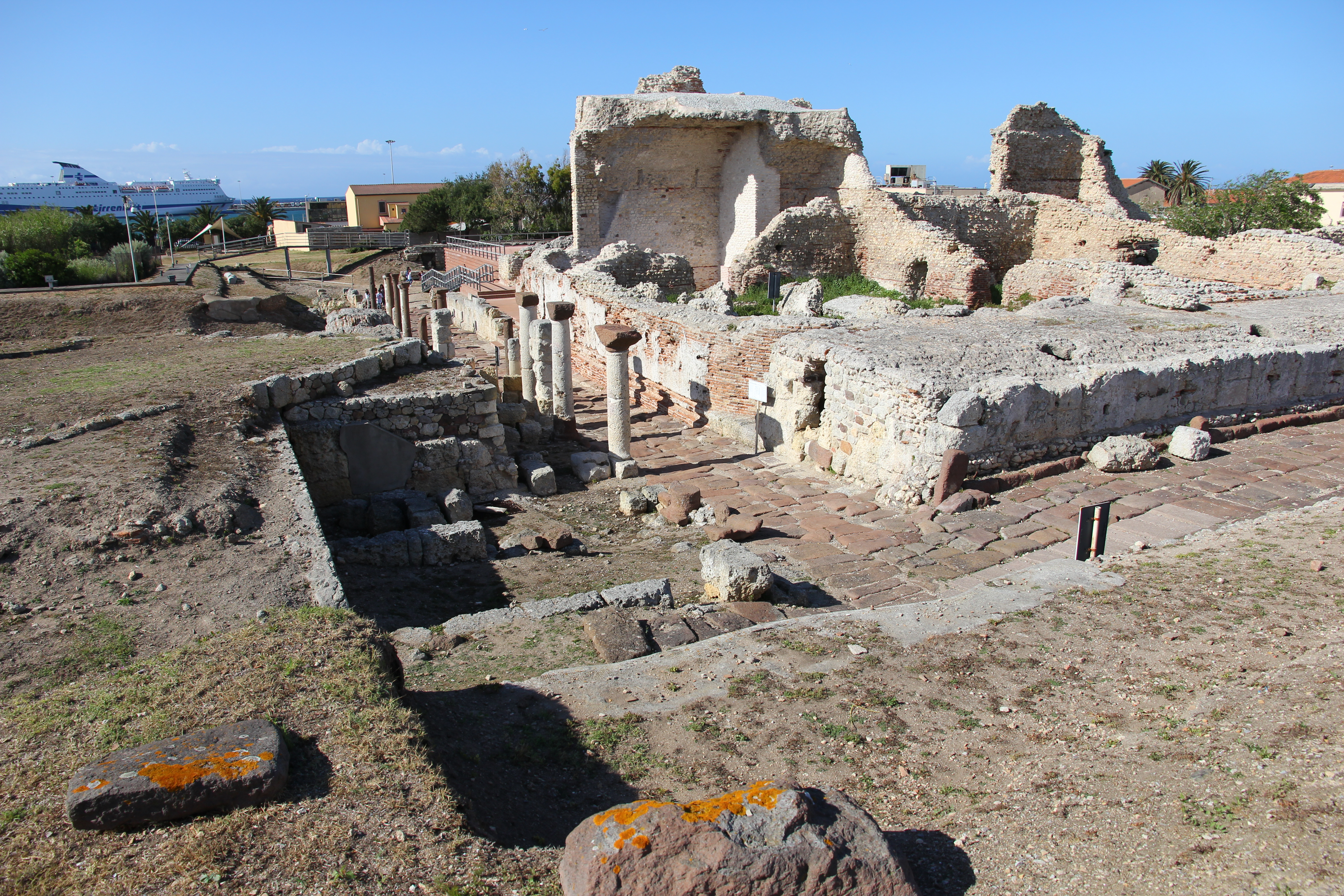 Porto Torres - Terme romane del palazzo di re Barbaro